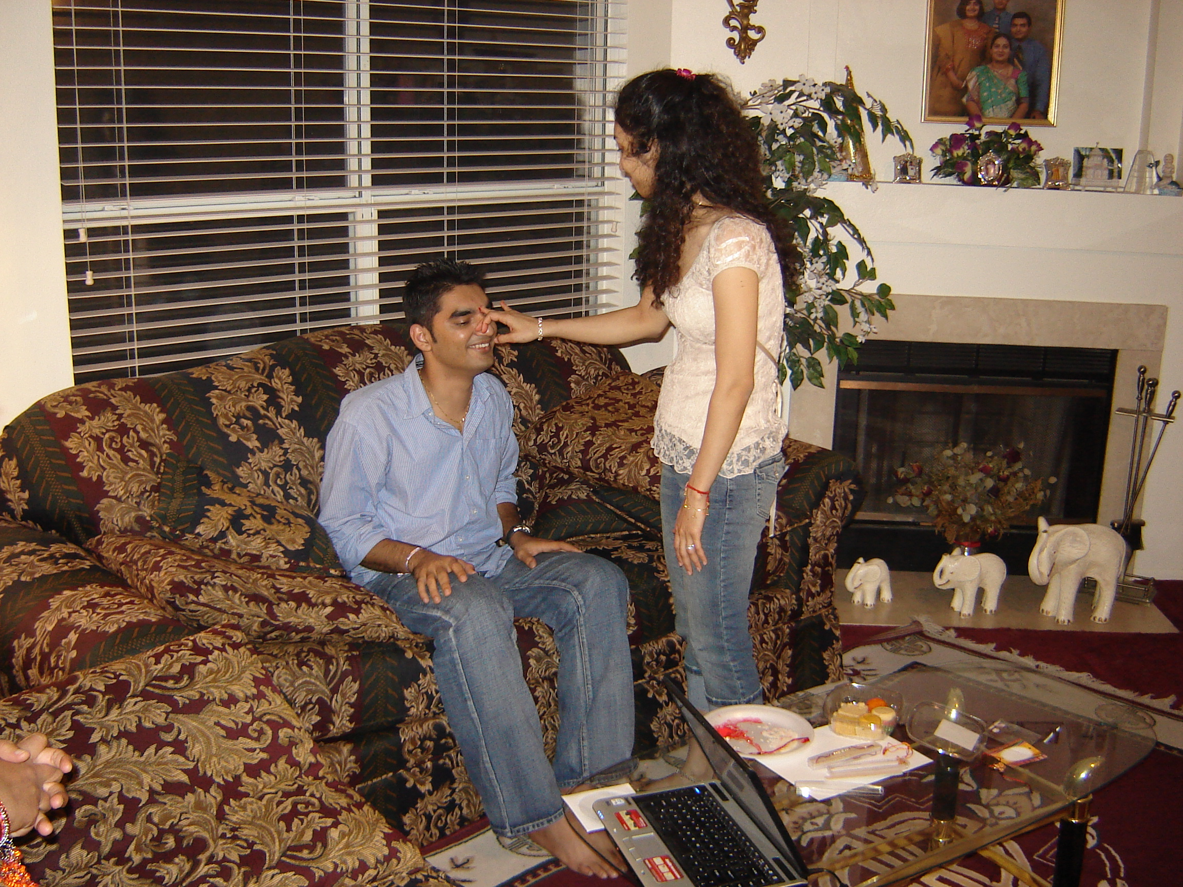 Rakhi, Rakhri, Tilak, August festival Hinduism